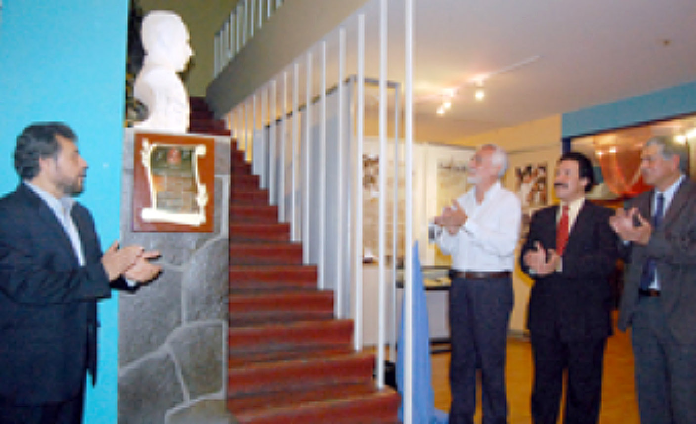 Ingeniero Félix Ulloa, rector mártir de la Universidad de El Salvador, UES.